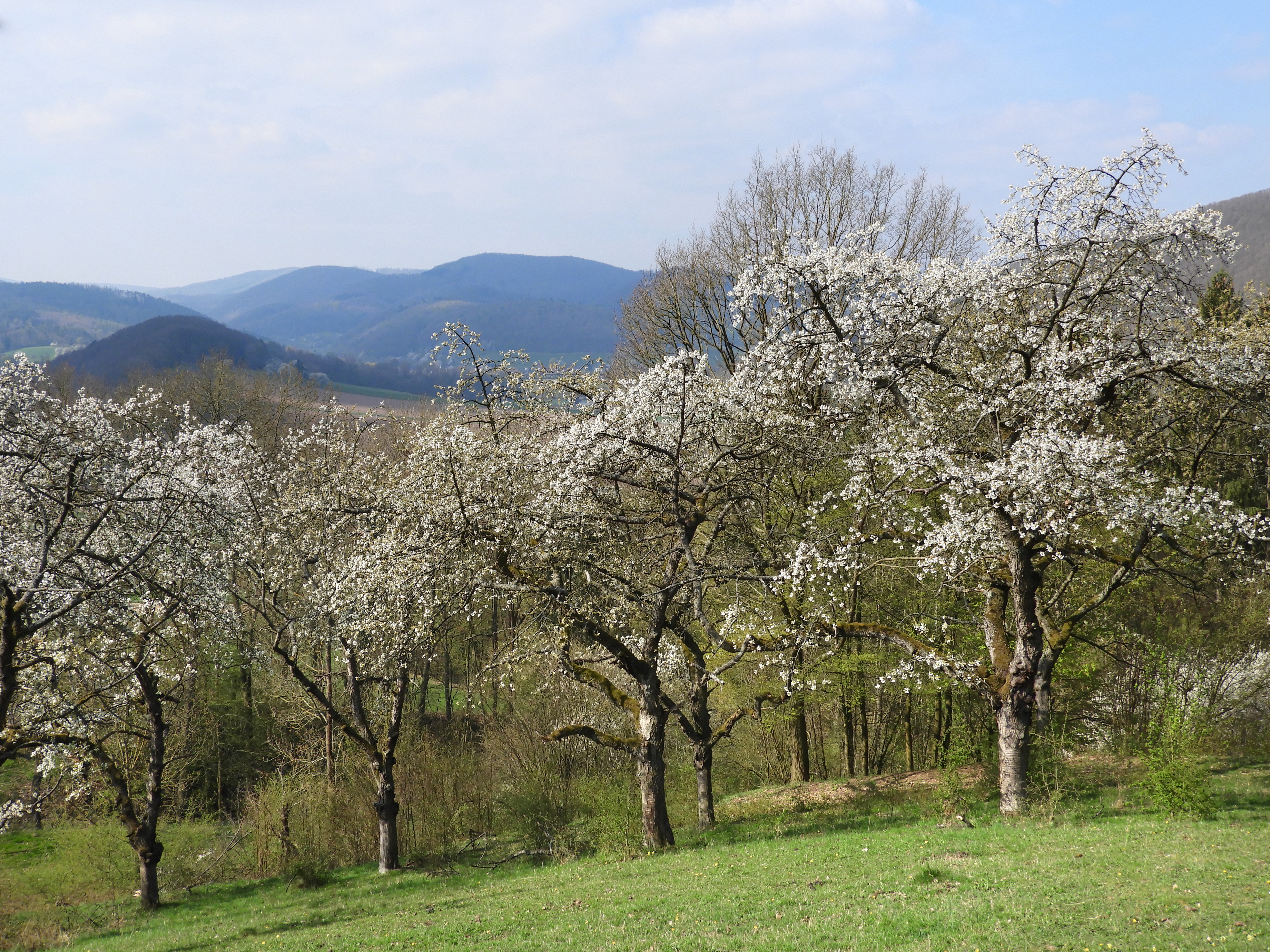 Das Naturschutzgebiet und Natura 2000-Gebiet liegt in den Gemarkungen der Gemeinden Lindewerra und Bornhagen der Verwaltungsgemeinschaft Hanstein-Rusteberg im thüringischen Landkreis Eichsfeld. Es befindet sich innerhalb des Bundsandsteingebiets des Höhebergs. Das Naturschutzgebiet hat die thüringeninterne Kennung 194 und den WDPA-Code 164048. Als FFH-Gebiet hat es in Thüringen die Nummer 16, die europäische Gebietsnummer 4625-303 und den WDPA-Code 555519946. Es liegt vollständig im EU-Vogelschutzgebiet „Werrabergland südwestlich Uder“ mit der Gebietsnummer 4626-420, der thüringeninternen Nummer 12 und dem WDPA-Code 555537539.